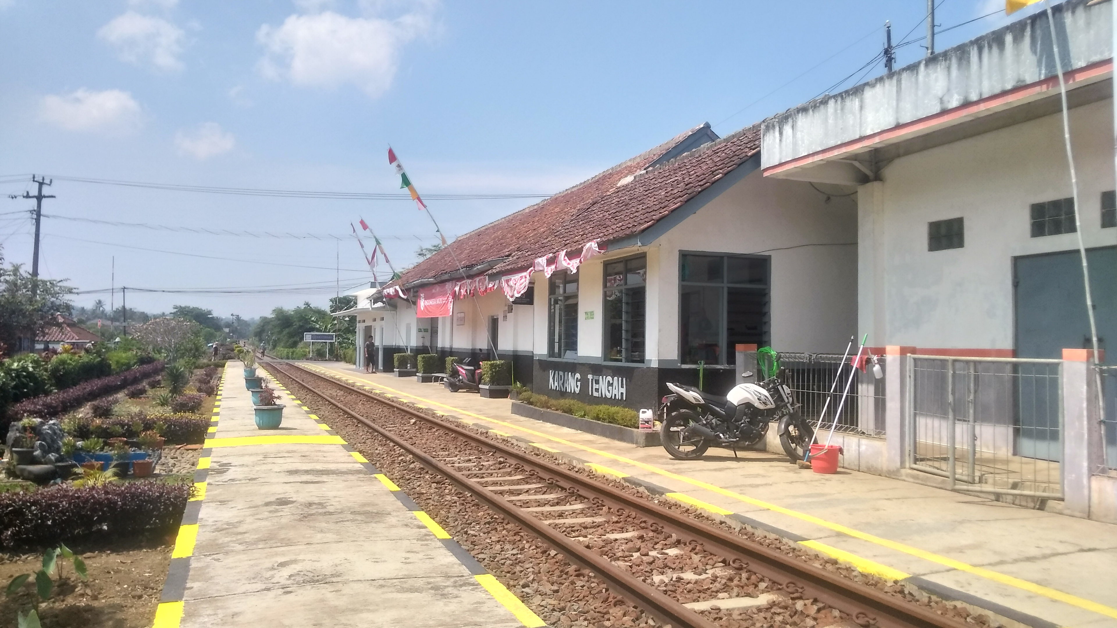 Stasiun Karangtengah